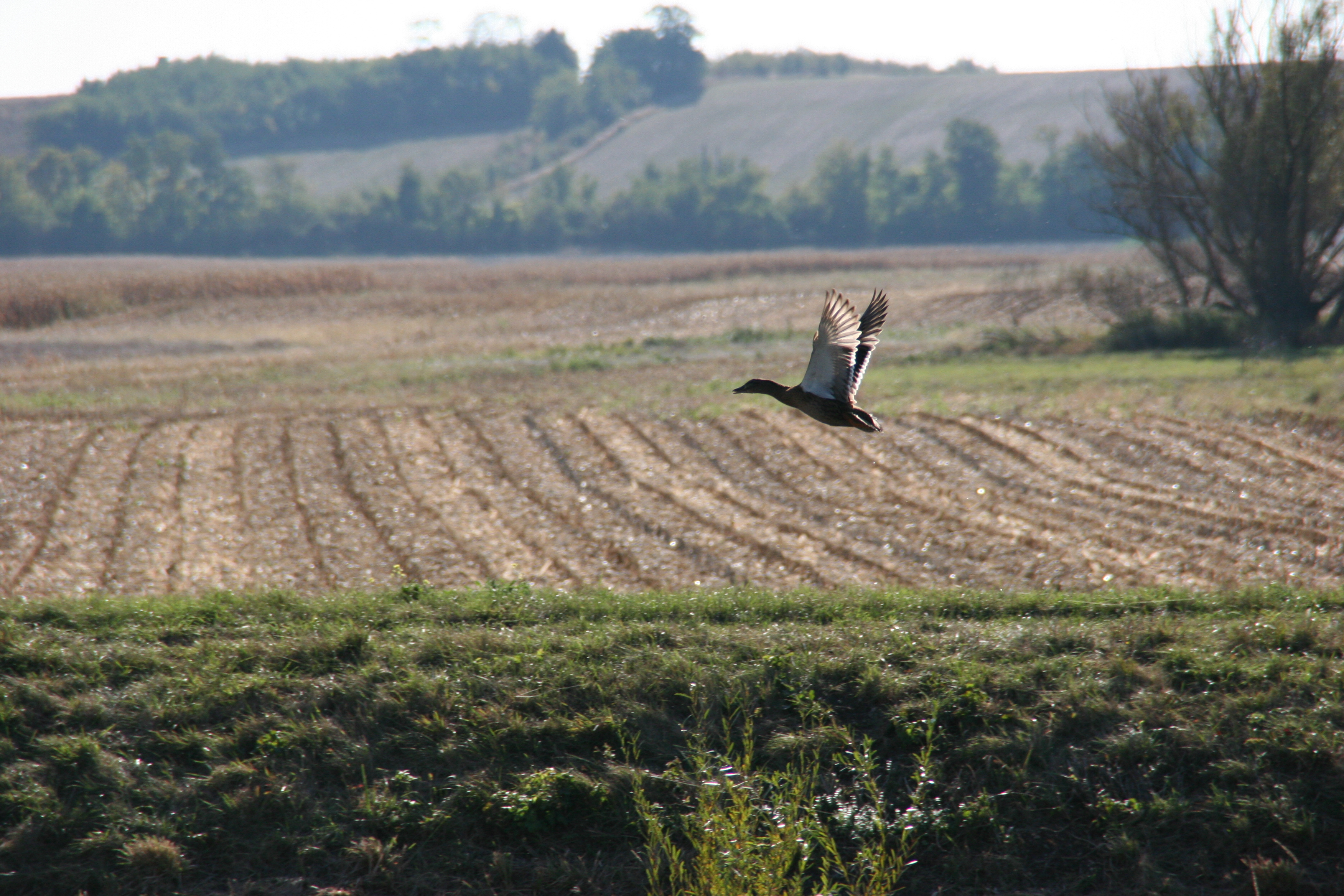 Nickelsdorf